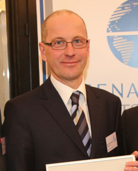 Friedrich Faulhammer